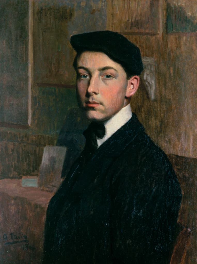 Autorretrato de Germán Taibo de 1906. Actualmente nun dos salóns do Palacio de María Pita, sede do goberno local da Coruña.